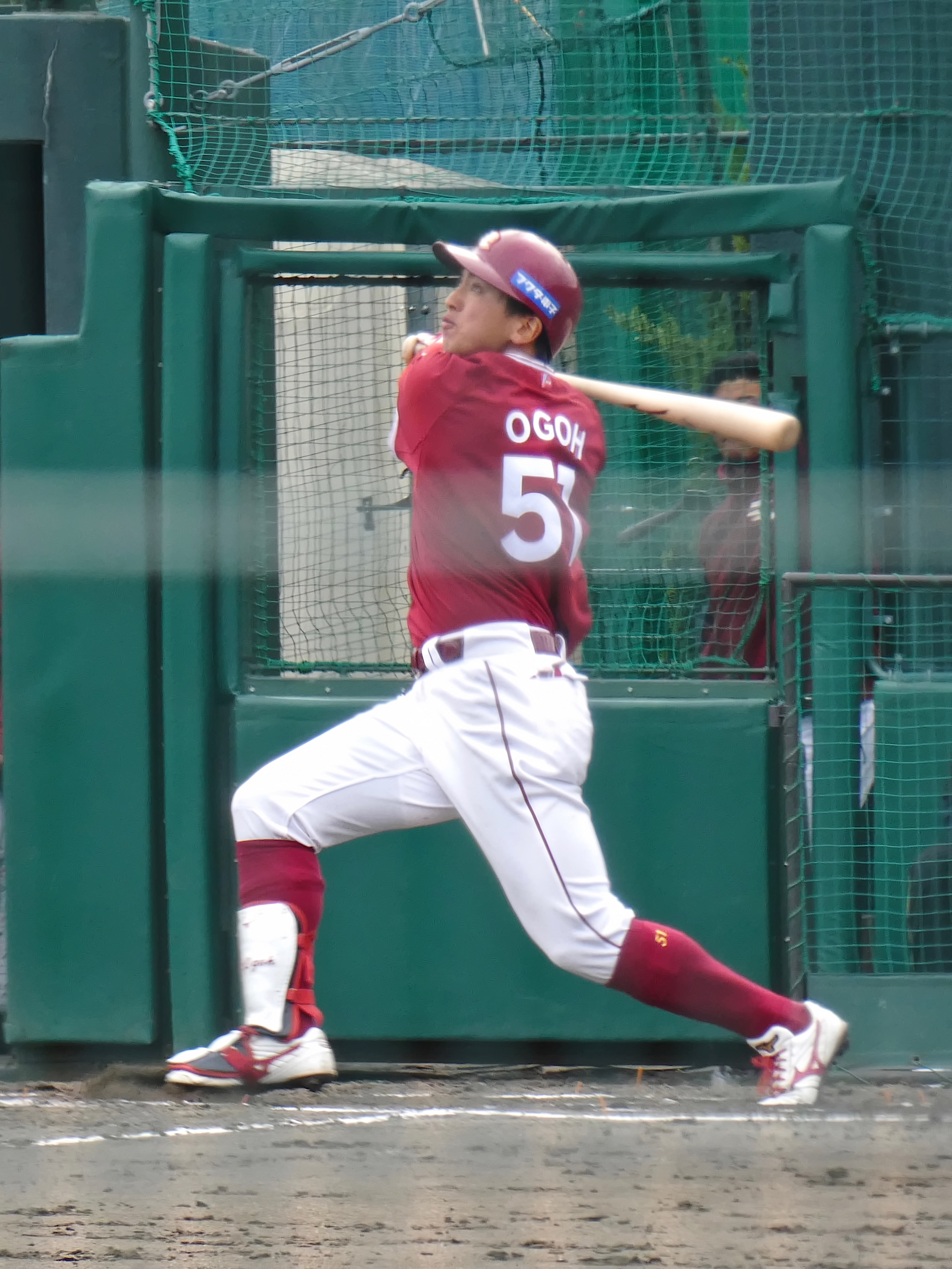 東北楽天ゴールデンイーグルスの選手「小郷裕哉」。ロッテ浦和球場にて。